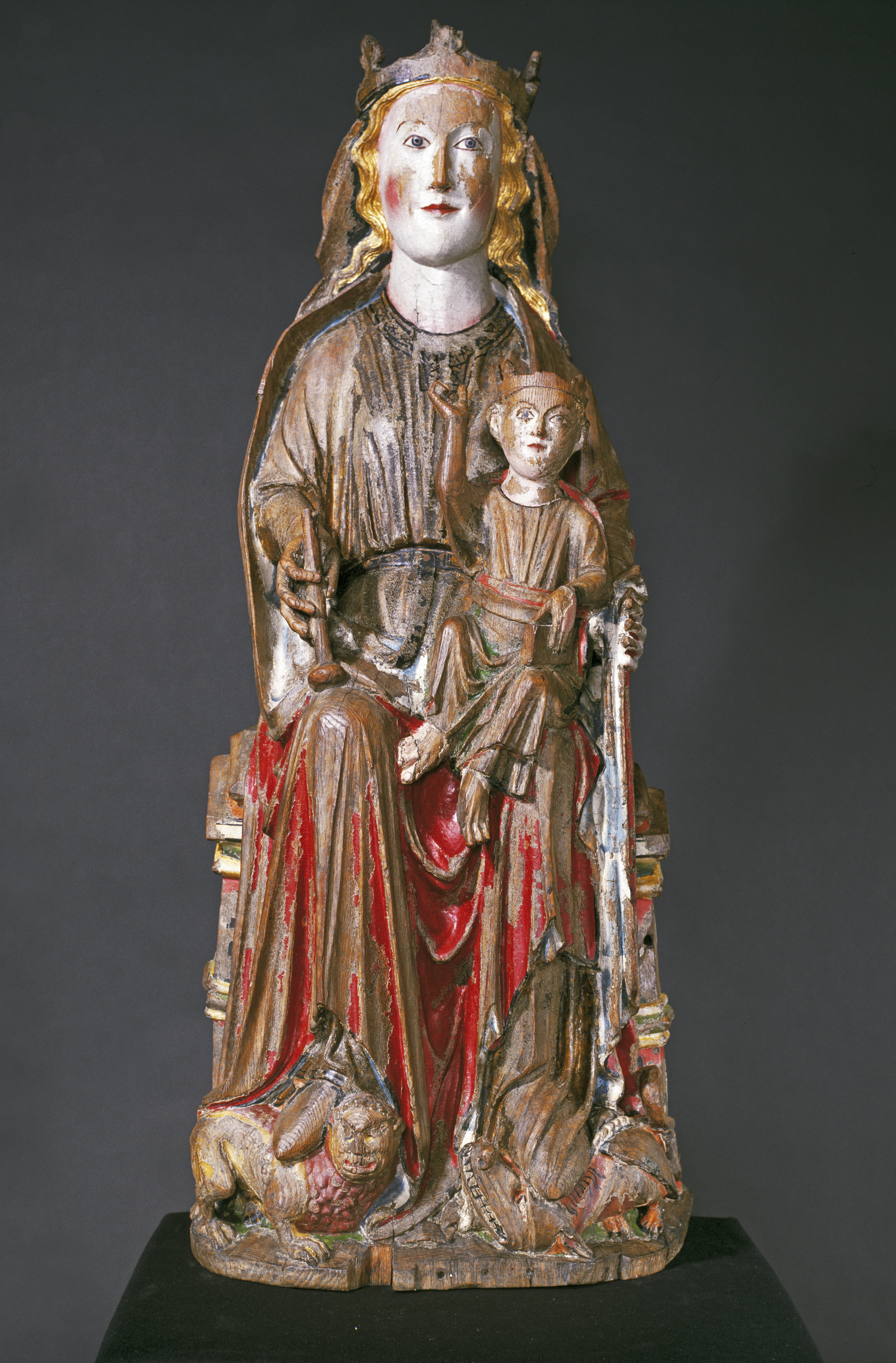 Biri-madonnaen; Virgin. Madonna med barn. Maria sitter på en trone med barnet på venstre kne. Høyre hånd holder et attributt, muligens en lilje. Under hennes føtter ligger en løve og en drage vendt mor hverandre. Hun har krone, drakt med dekor, og kappe med pelskrage. Barnet er iført krone, drakt og kappe. Han holder en bok i venstre hånd og løfter høyre i velsignelse. Norge, Oppland, GJØVIK, BIRI PRESTEGÅRD, 132